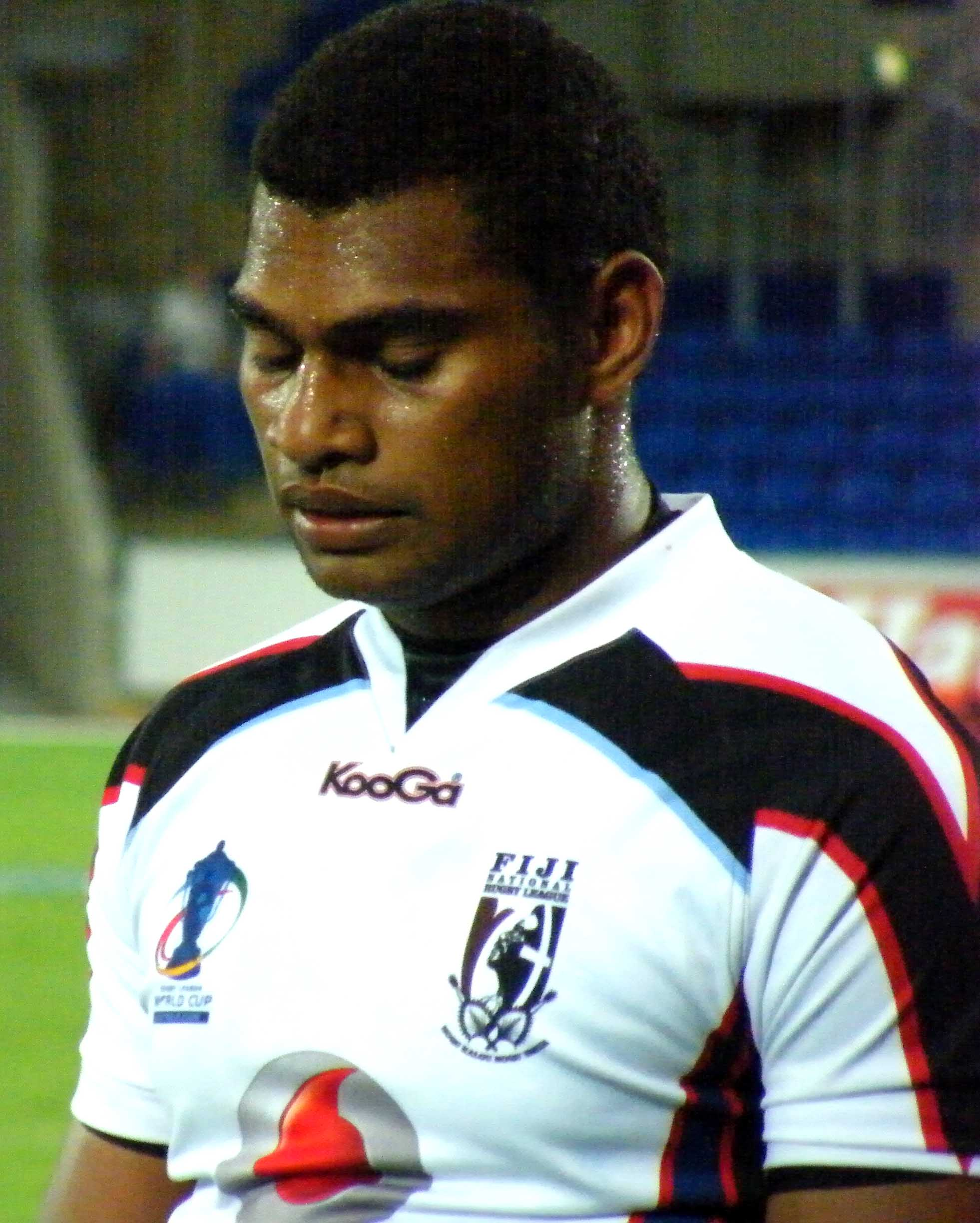 RLWC - Fiji v Ireland, Gold Coast 2008. Fijian interchange Vula Naqau.